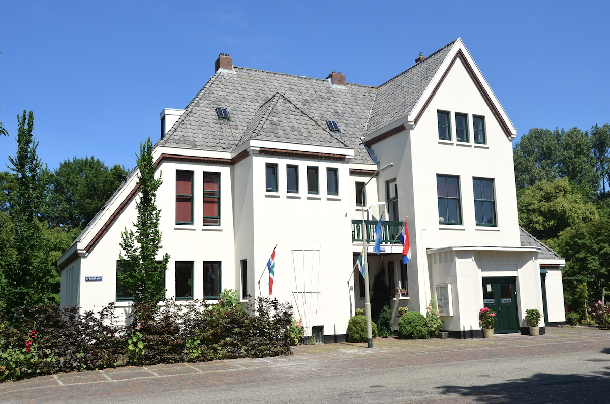 Het voormalige station te Ulrum aan de spoorlijn Spoorlijn Winsum - Zoutkamp (1922-1942). Foto: Erik Swierstra